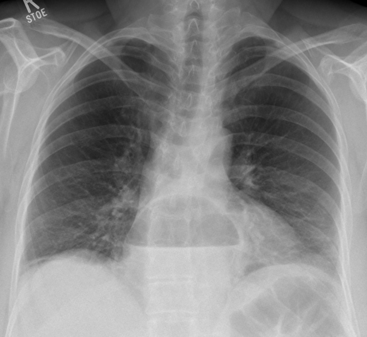 Große Hiatushernie mit Spiegelbildung im Thoraxübersichtsbild.